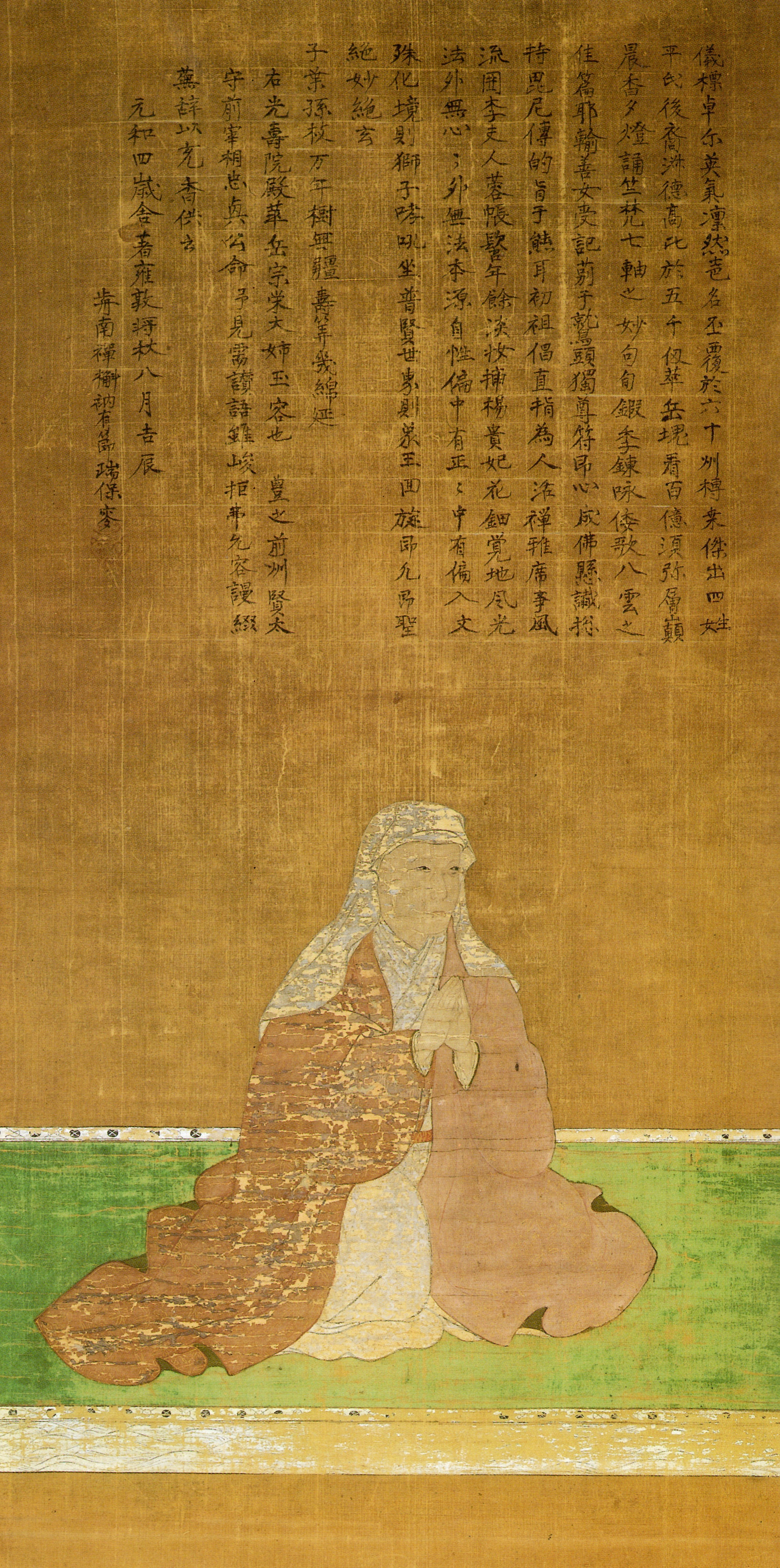 沼田麝香(細川幽斎室)の肖像。